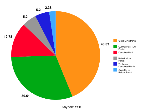 Kıbrıs'ın Taşpınar köyünde 2009 KKTC Genel Seçimlerinde alınan sonuçlar.